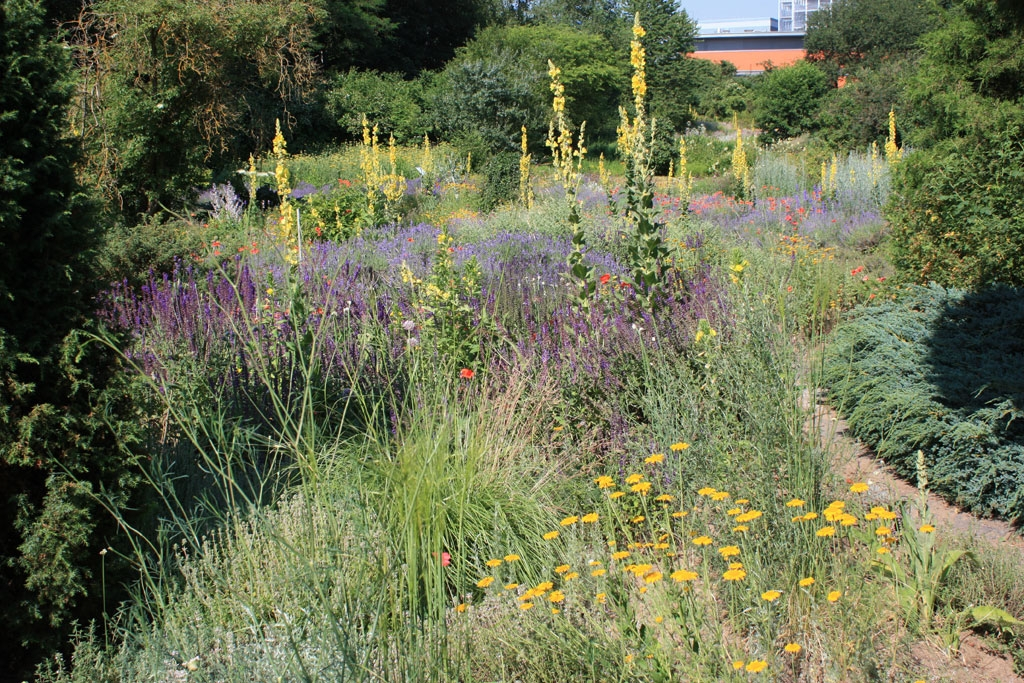 Königskerze